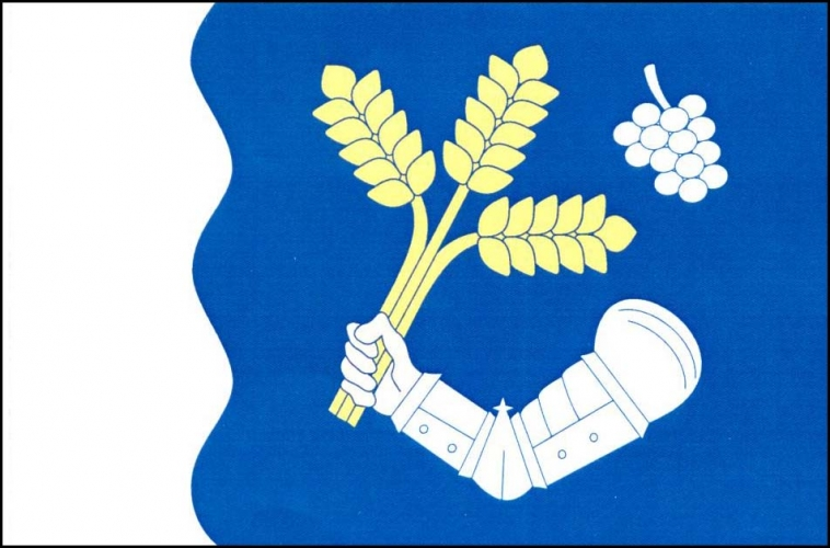 vlajka, Plenkovice, okres Znojmo